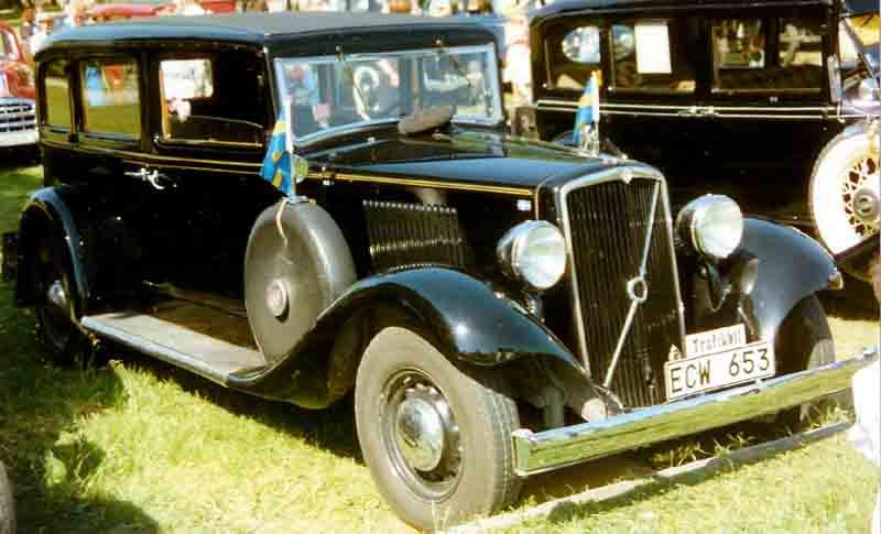 Volvo TR704 4-Door Sedan 1937